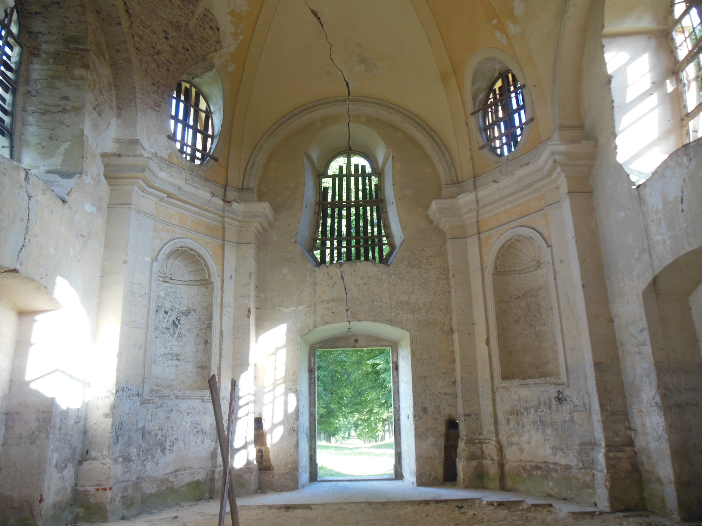 Sloup v Čechách (okres Česká Lípa). Ulice Novoborská, kaple svatého Jana Nepomuckého, interiér.